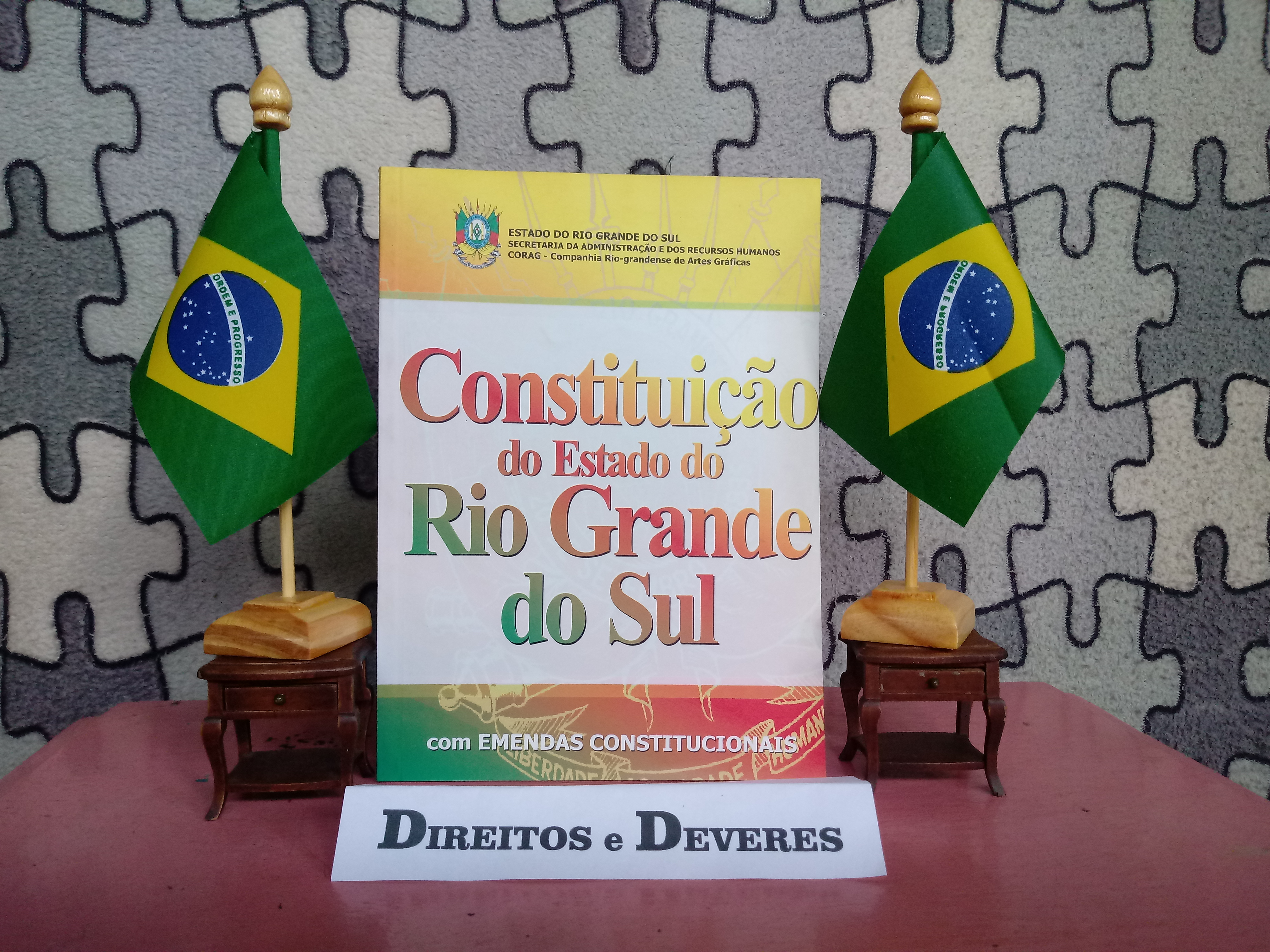 Constituições estaduais no Brasil: a Constituição do Estado do Rio Grande do Sul.